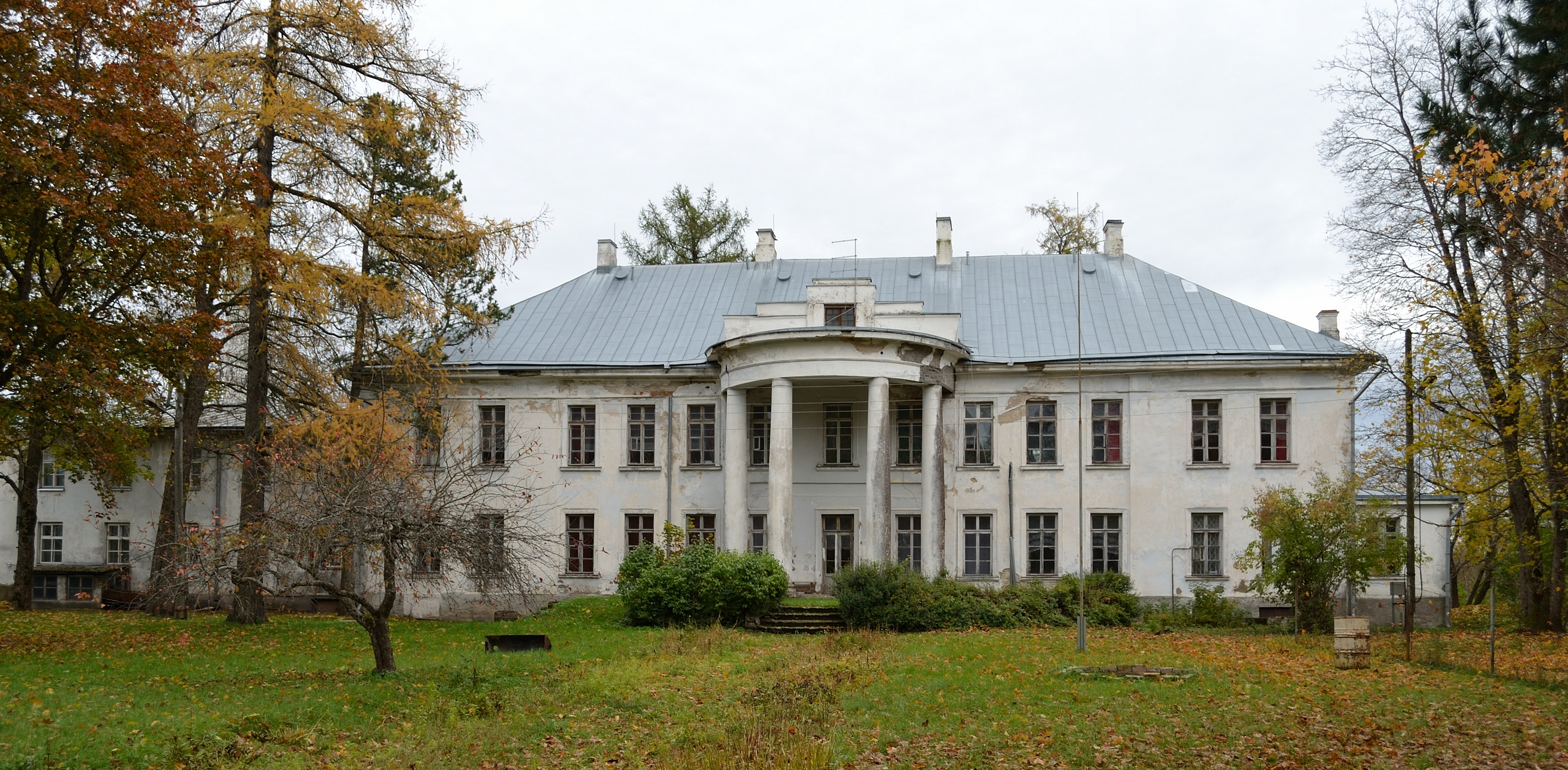 Kernu mõisa peahoone, 19.sajand